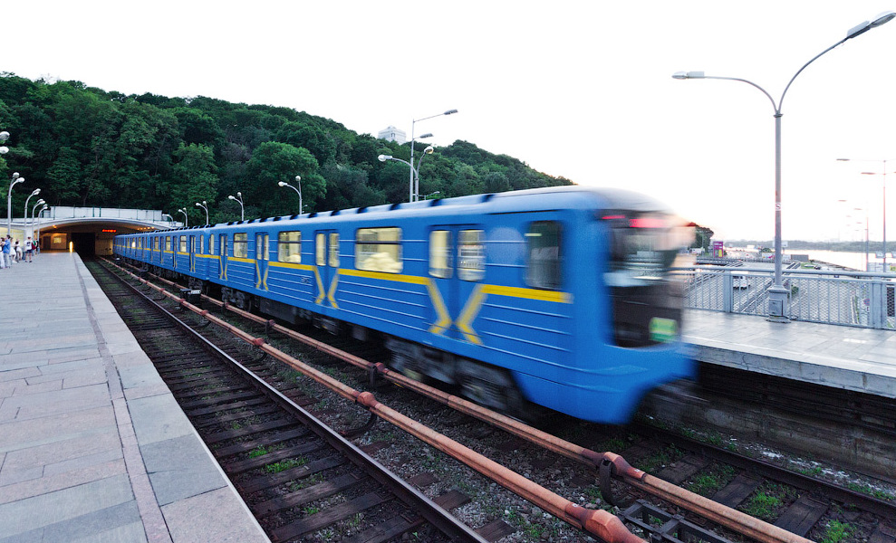 Электропоезд метро Е-КМ на станции Днепр